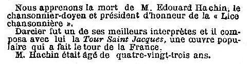 Annonce de la mort du goguettier Edouard Hachin, rubrique Tablettes théâtrales, Le Matin, 21 mai 1891, page 3, 4ème colonne.